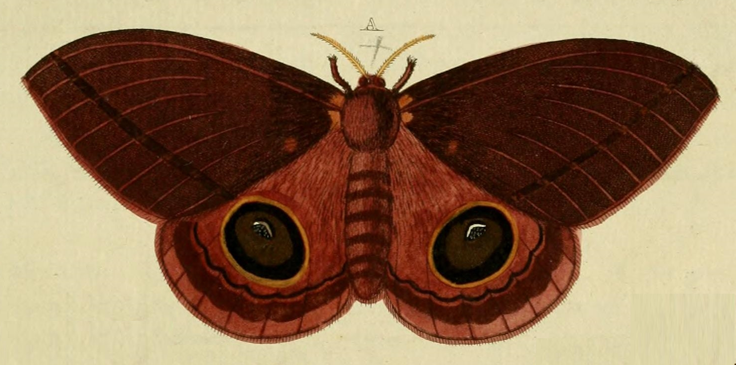 Ilustração de exemplar fêmea da mariposa Automeris arminia por Cramer & Stoll.